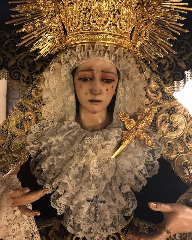 Nuestra Señora de la Amargura vestida para la Estación de Penitencia de 2018